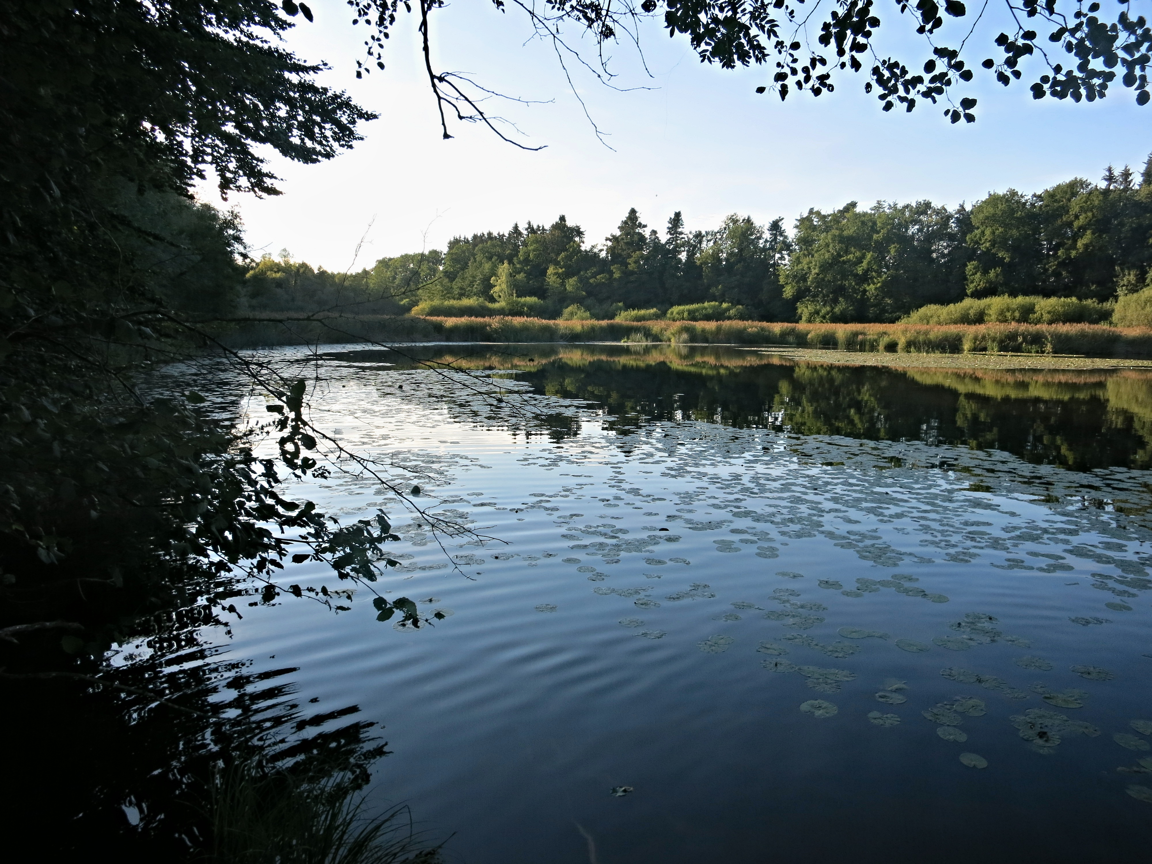 Biessenhofer Weier